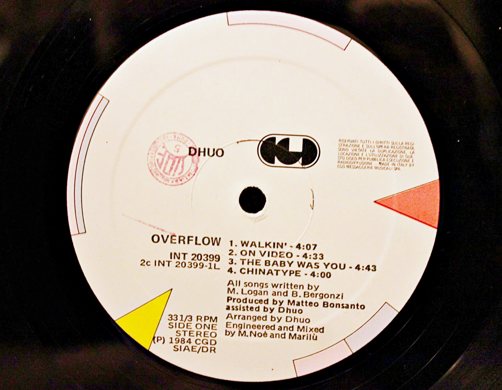 etichetta album "Overflow" - Dhuo, grupoo composto da Bruno Bergonzi e da Mike Logan - 1984